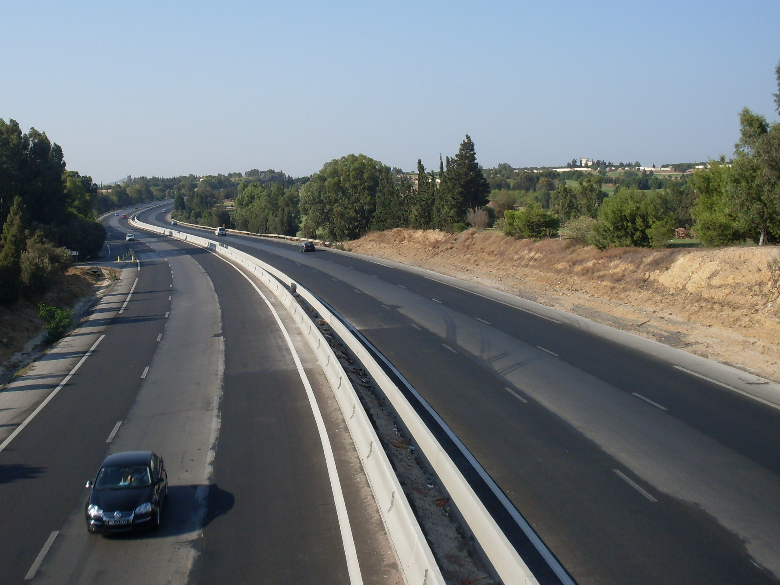 Nouvelle extension sur l'autoroute A1 au niveau de hammamet